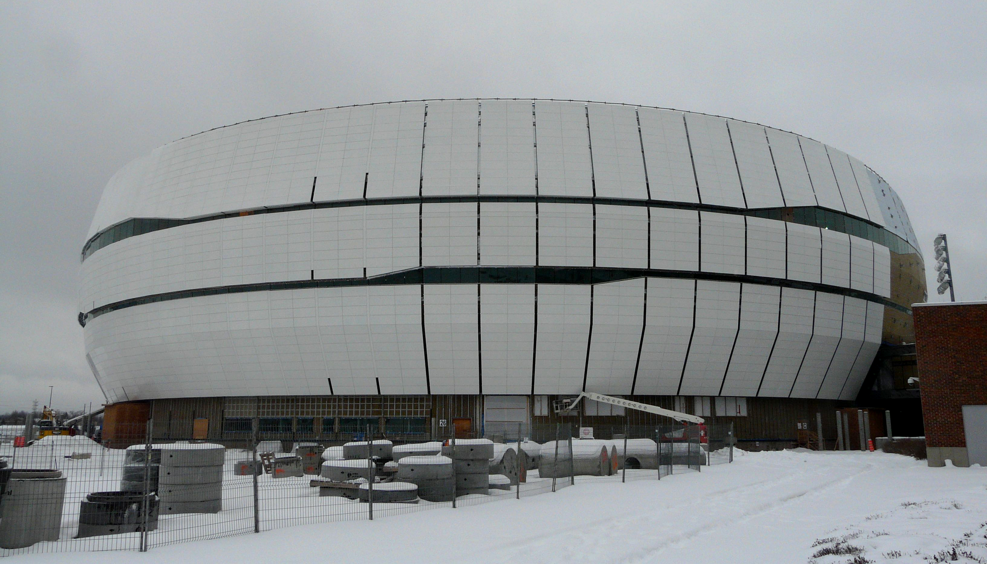 Amphithéâtre de Québec